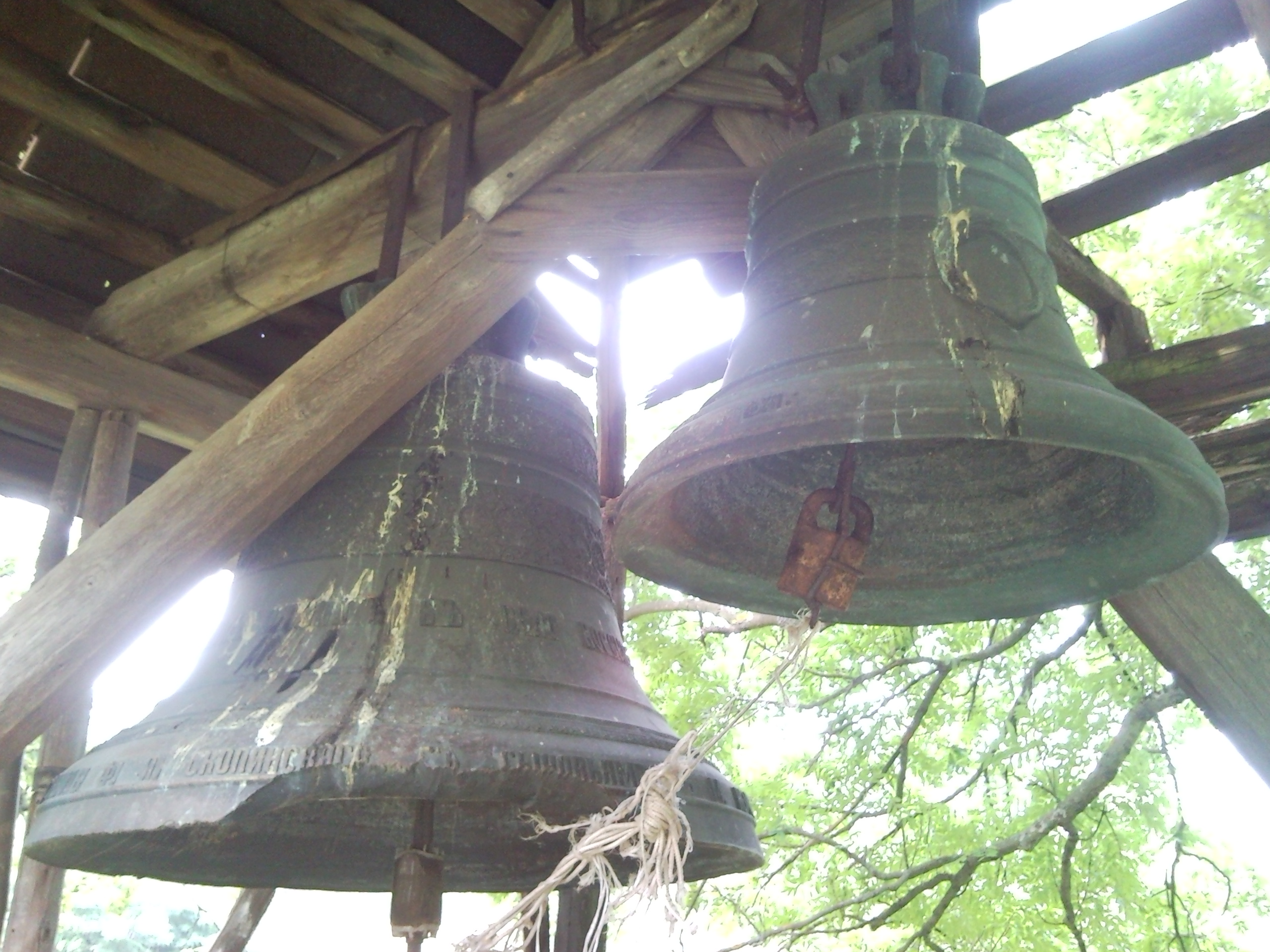 Борсків Дзвіниця